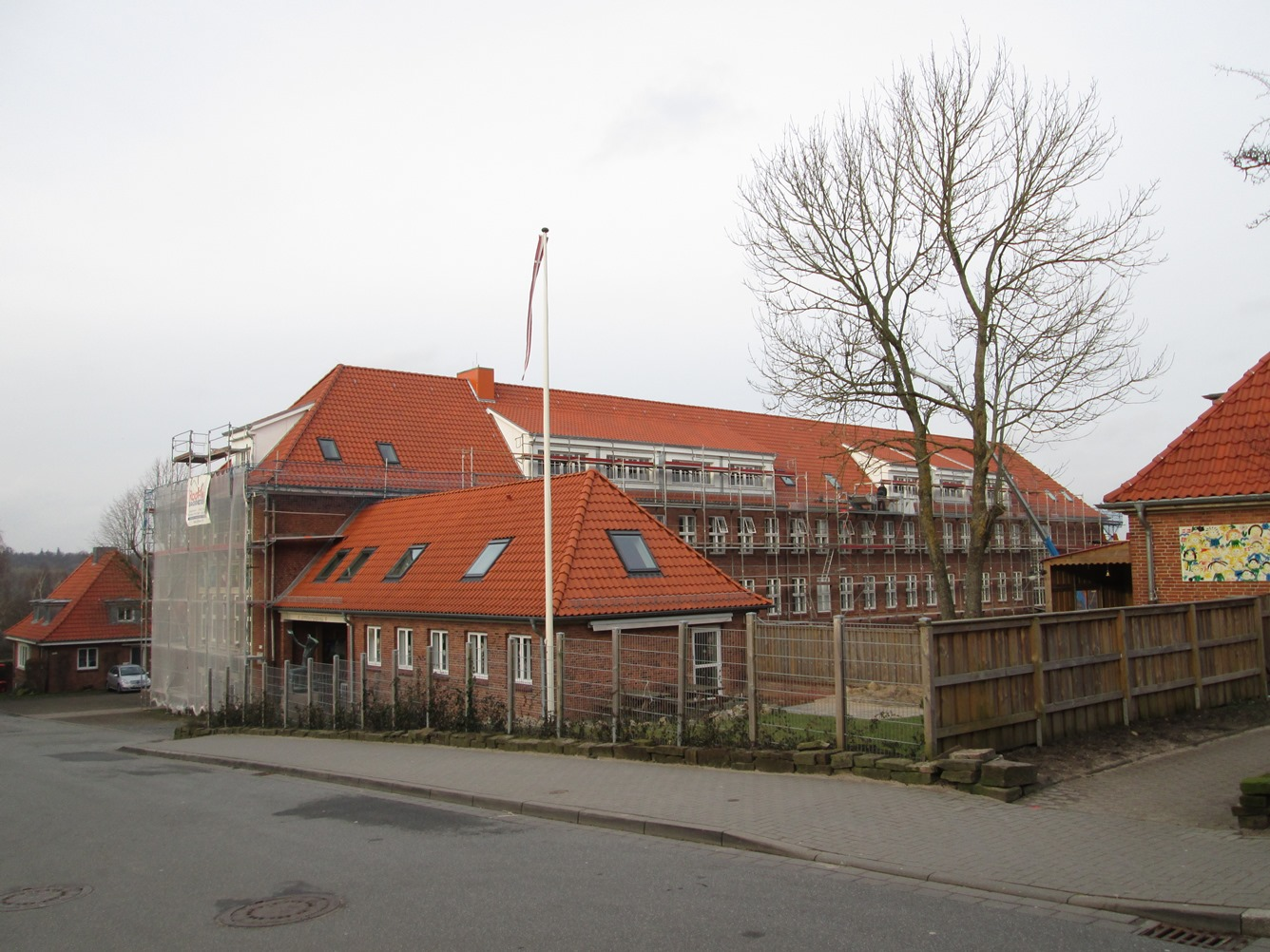 Gottorp-Skolen i Slesvig-Frederiksberg